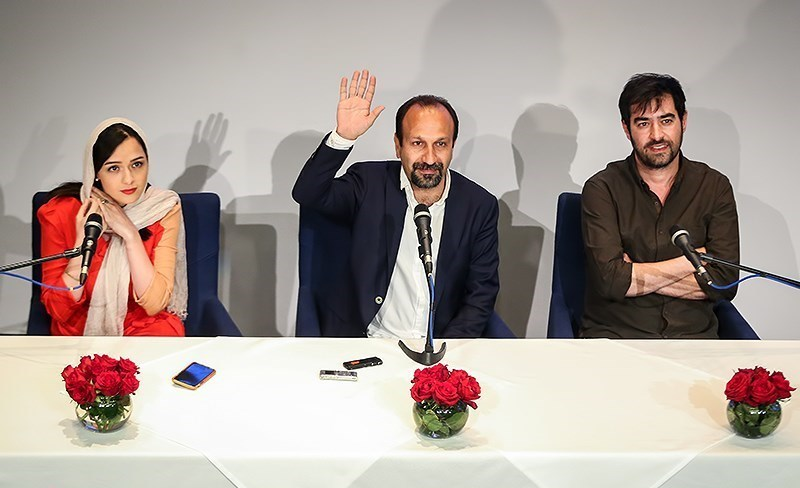 نشست خبری فیلم سینمایی فروشنده با حضور اصغر فرهادی کارگردان و شهاب حسینی و ترانه علیدوستی بازیگران این فیلم شامگاه دوشنبه ۱۰ خرداد ۱۳۹۵ در خانه همایش